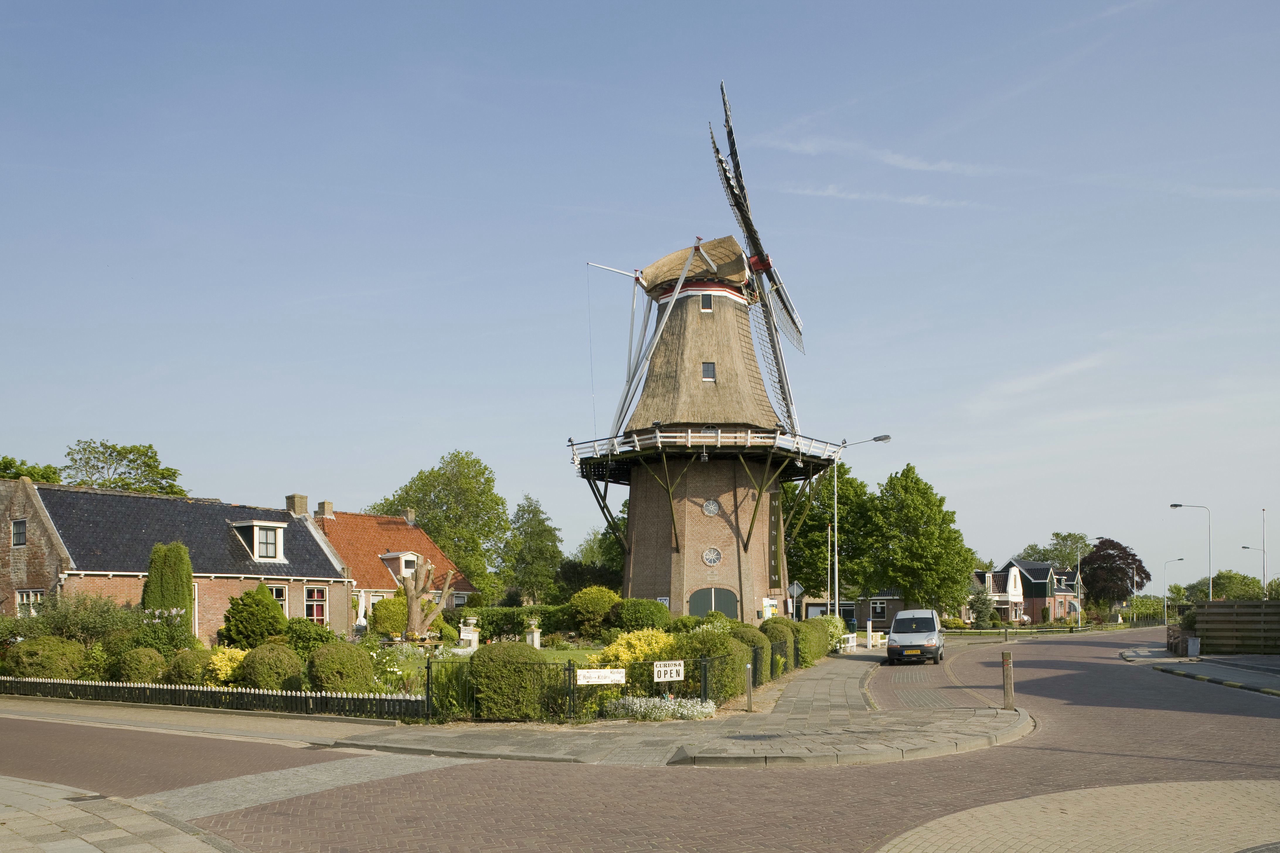 Korenmolen "De Eendragt": Overzicht van de molen (opmerking: Project RRWR)